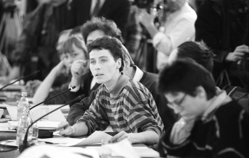 ADN-ZB/Mittelstädt/ 15.1.1990/ Berlin: 7. Runder Tisch/ Im Mittelpunkt der Beratung der 16 Parteien, politischen Gruppierungen und Organisationen im Konferenzzentrum Niederschönhausen stehen ein Bericht der Regierung zur inneren Lage, Wahlgesetz sowie Parteien- und Vereinigungsgesetz. Mitte: Ingrid Köppe vom Neuen Forum